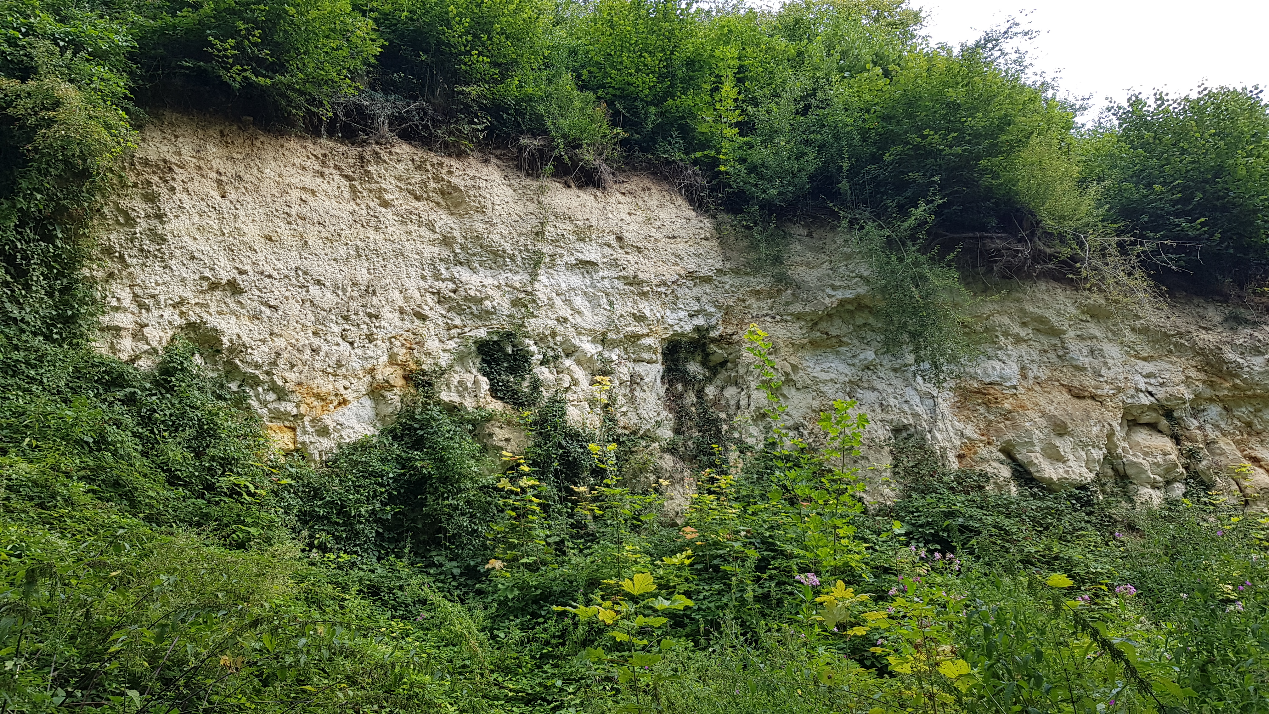 Groeve Kasteel Oost, Valkenburg, Limburg, Nederland